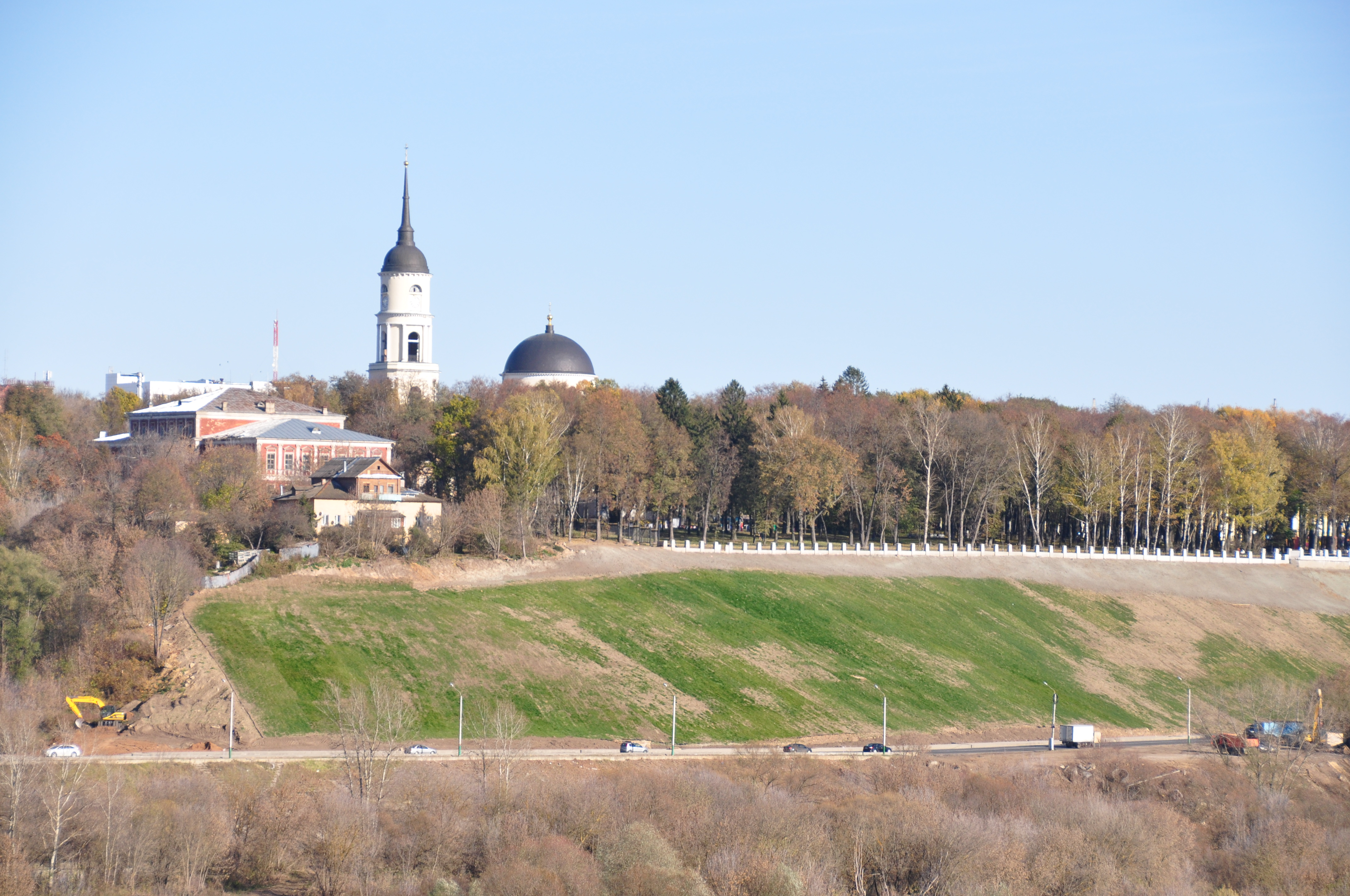 Kalouga - Калуга